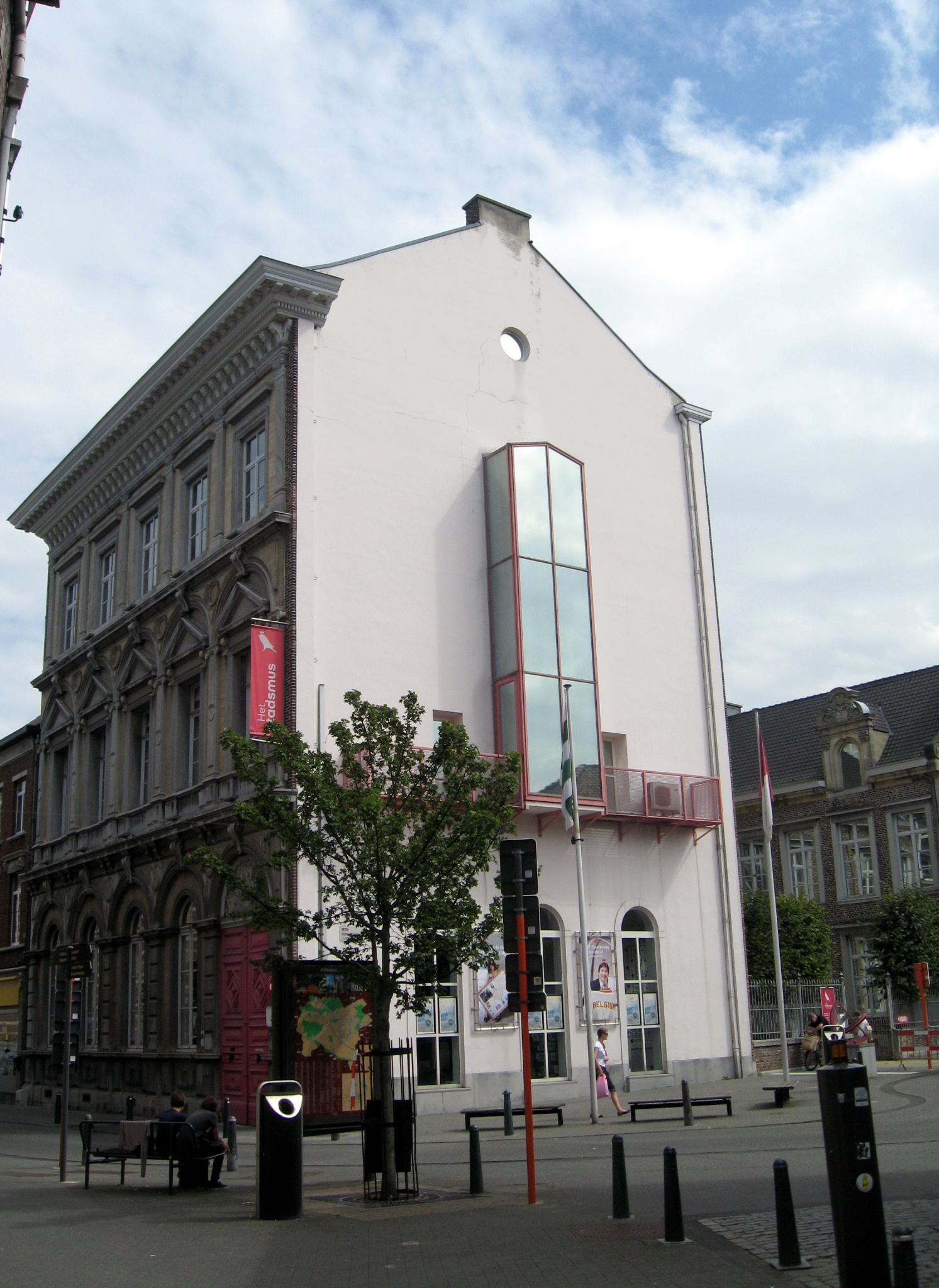 Het Huis Stellingwerff-Waerdenhof in Hasselt, waarin Het Stadsmus is gevestigd